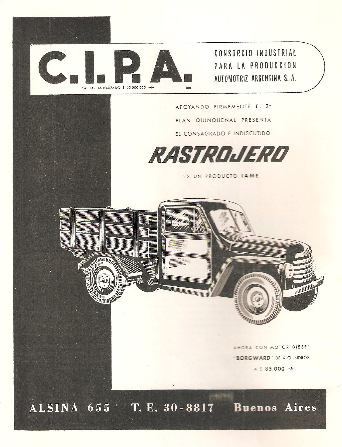 Anuncio de un Rastrojero en el nº 227 de noviembre de 1954 año XXI vol XXXVIII de la Revista Geográfica Americana.